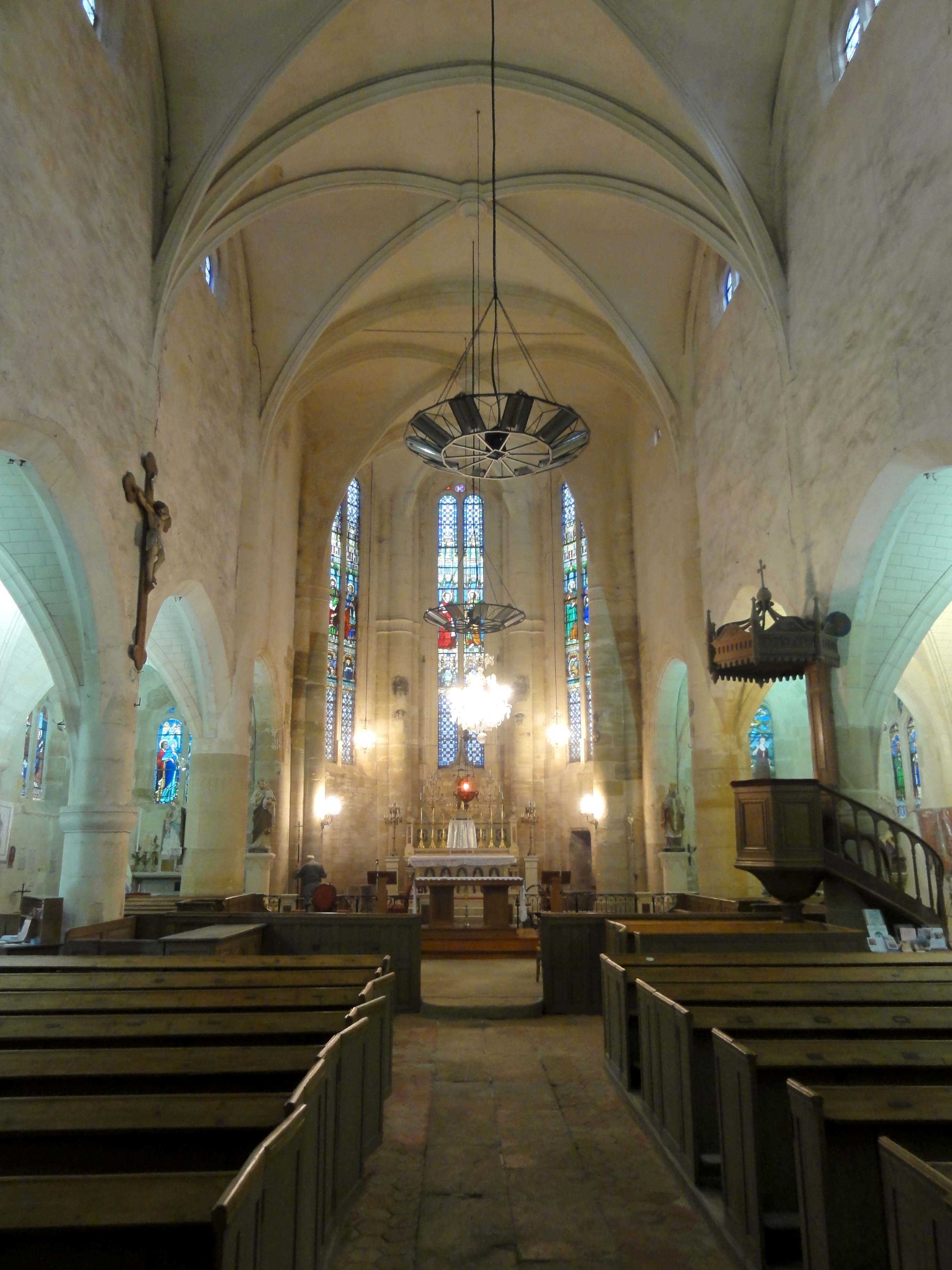 Intérieur de l'église - voir titre.